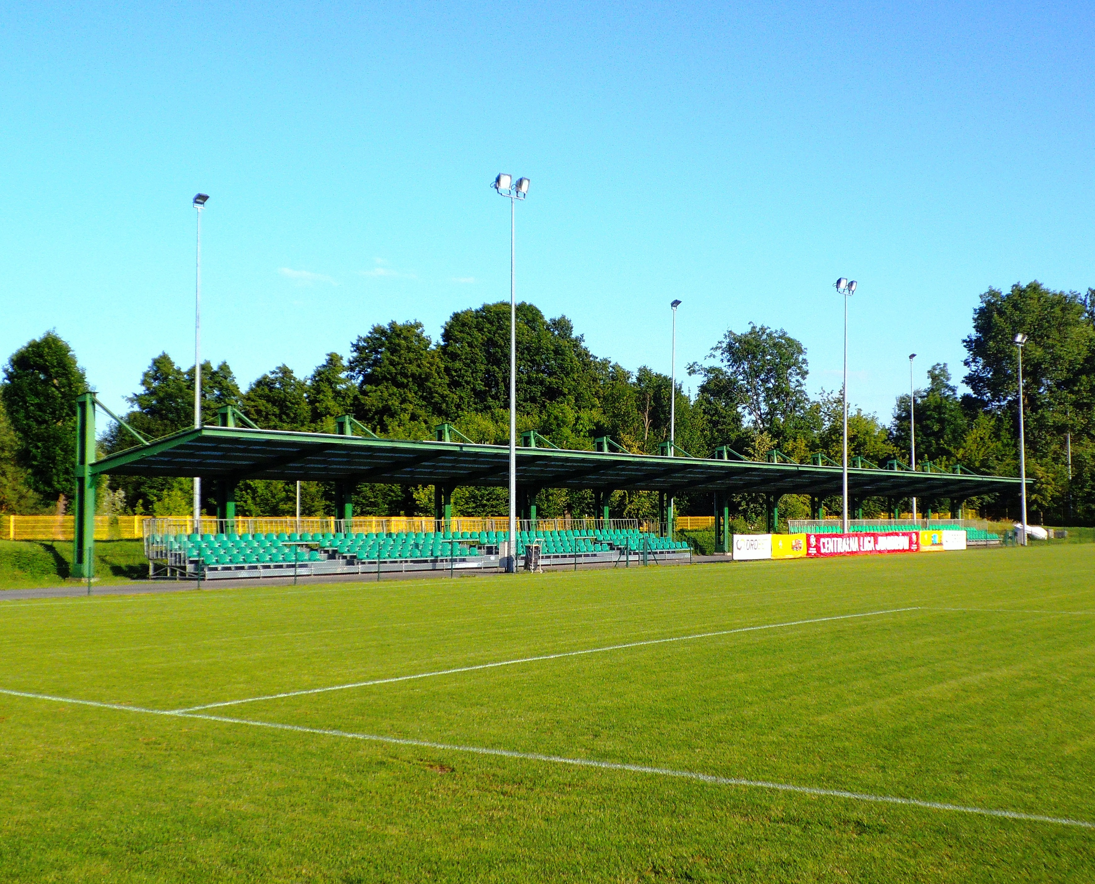 Stadion przy ul. Armii Ludowej w Toruniu1